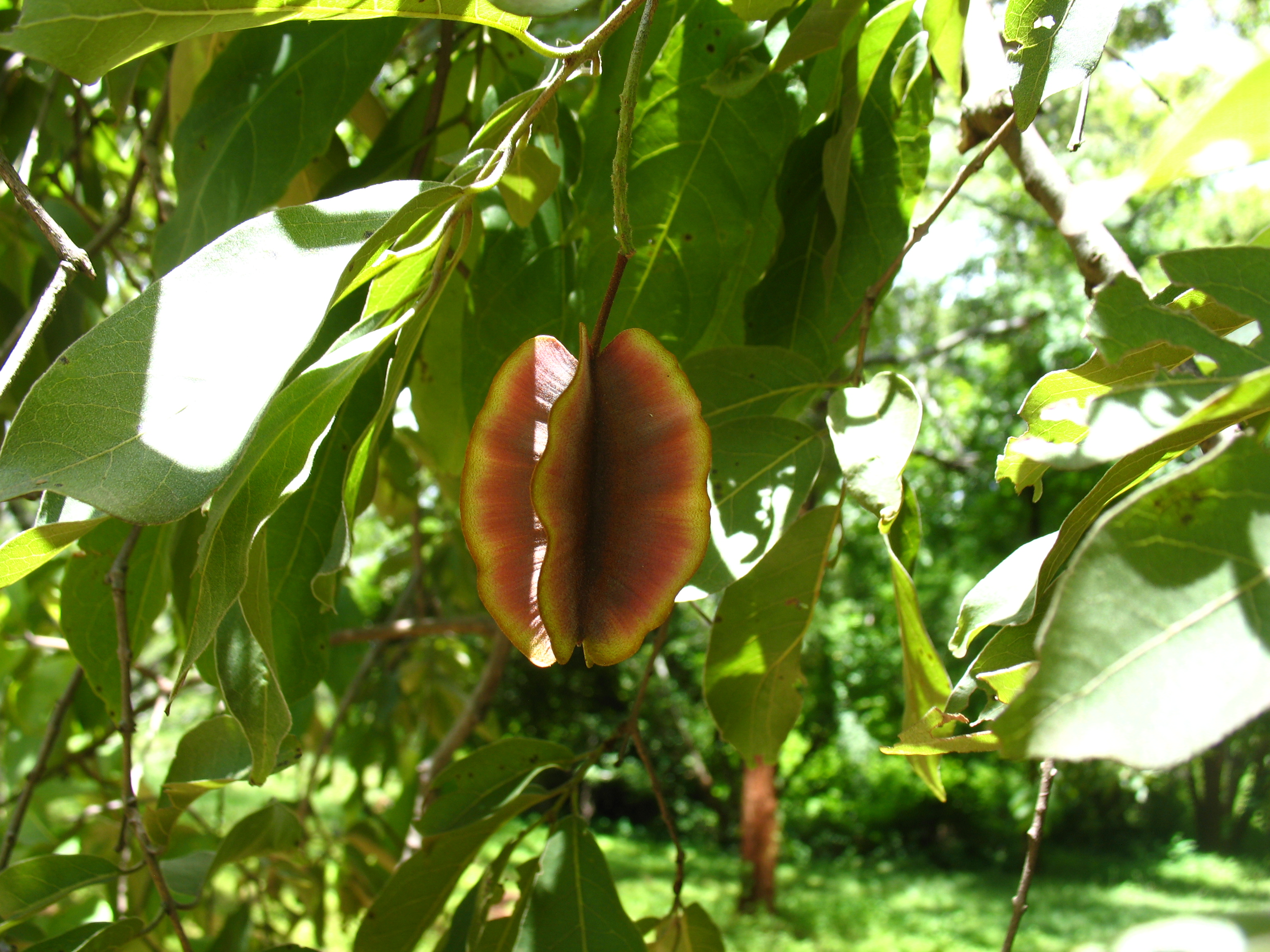 Combretum collinum, taken in Belgravia, Harare.